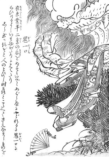 Onihitokuchi (鬼一口) from the Konjaku Hyakki Shūi (今昔百鬼拾遺)